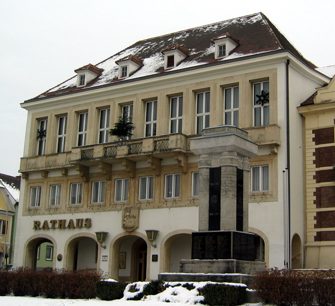 Pinkafeld, Rathaus